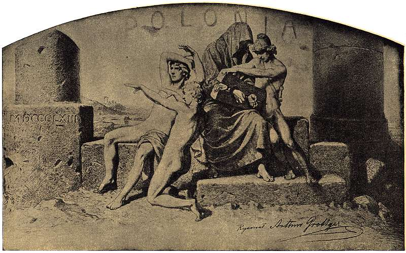 Cykl "Polonia", I. Karta tytułowa by Artur Grottger